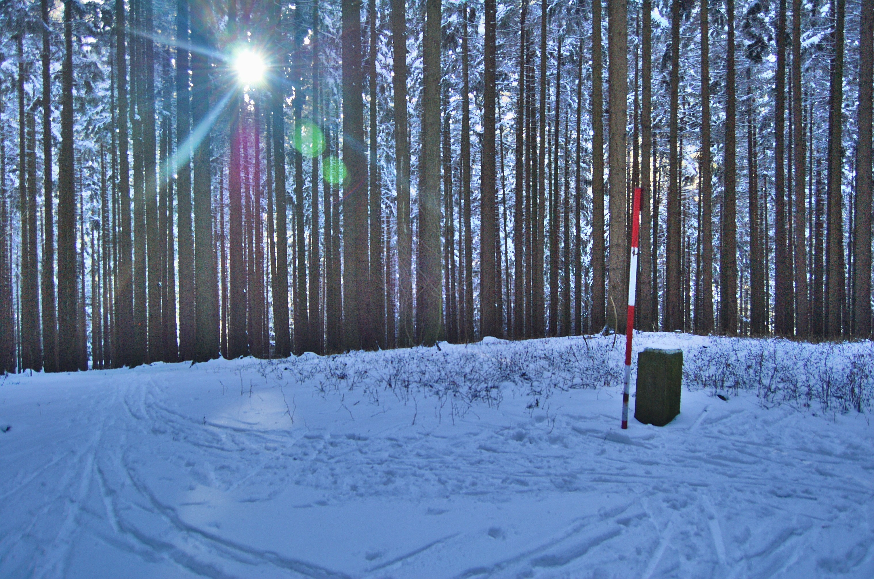 Paprč, Benešov, okres Blansko